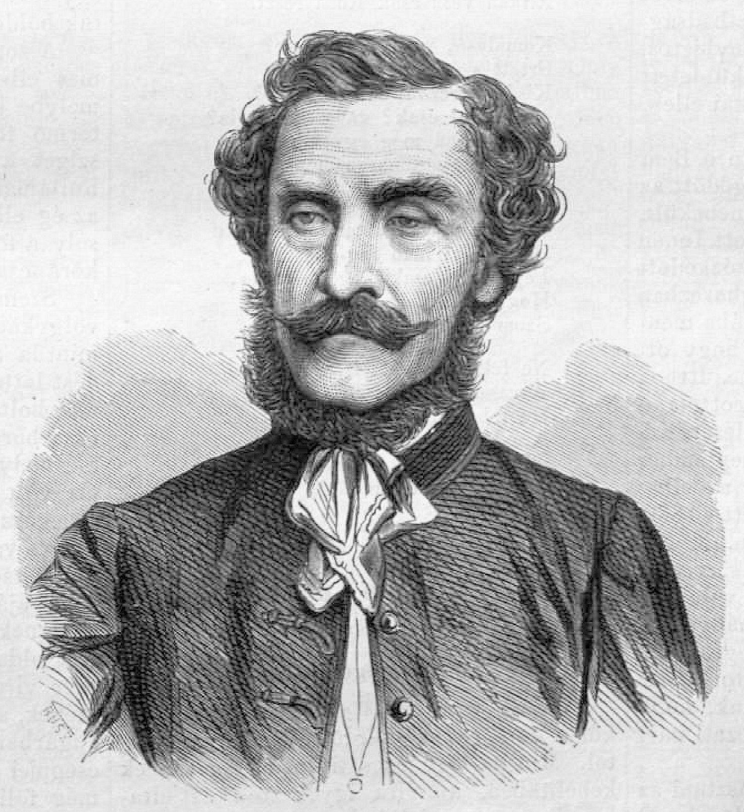 Balogh János (1796–1872) politikus, honvédtiszt portréja. Rusz Károly metszete